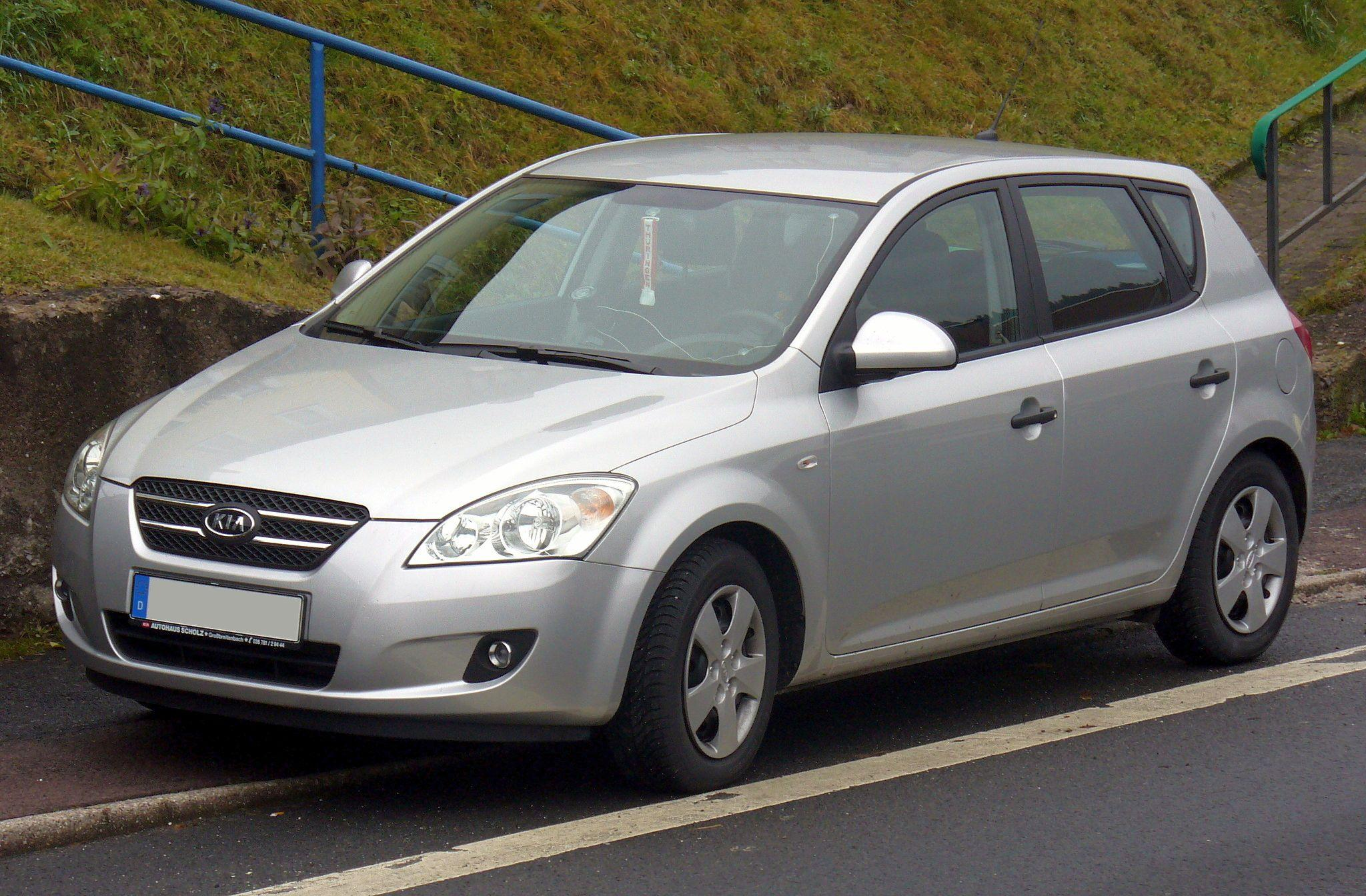 Kia cee'd LX